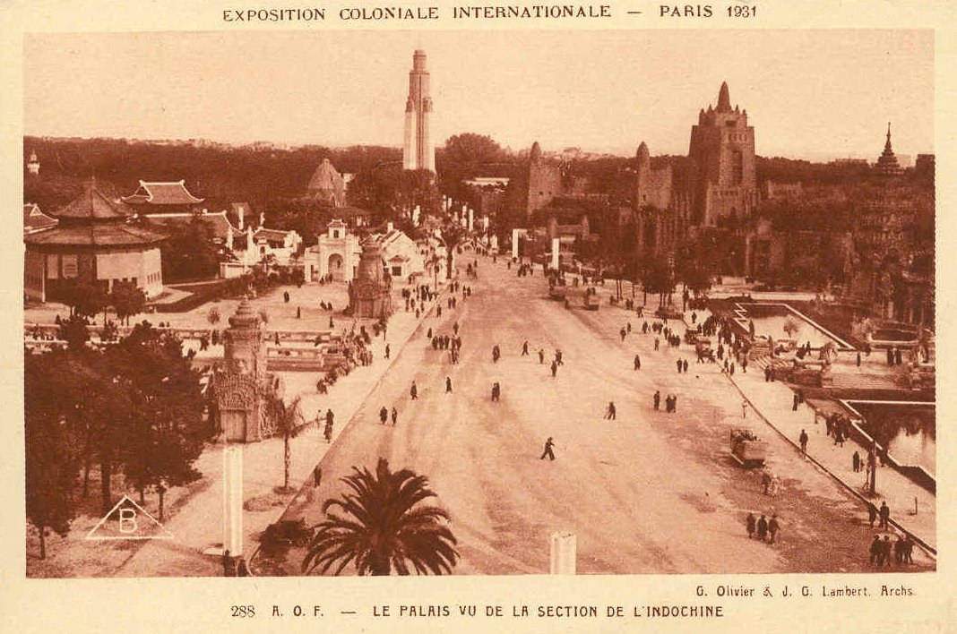 Vue générale de l'Avenue des Colonies